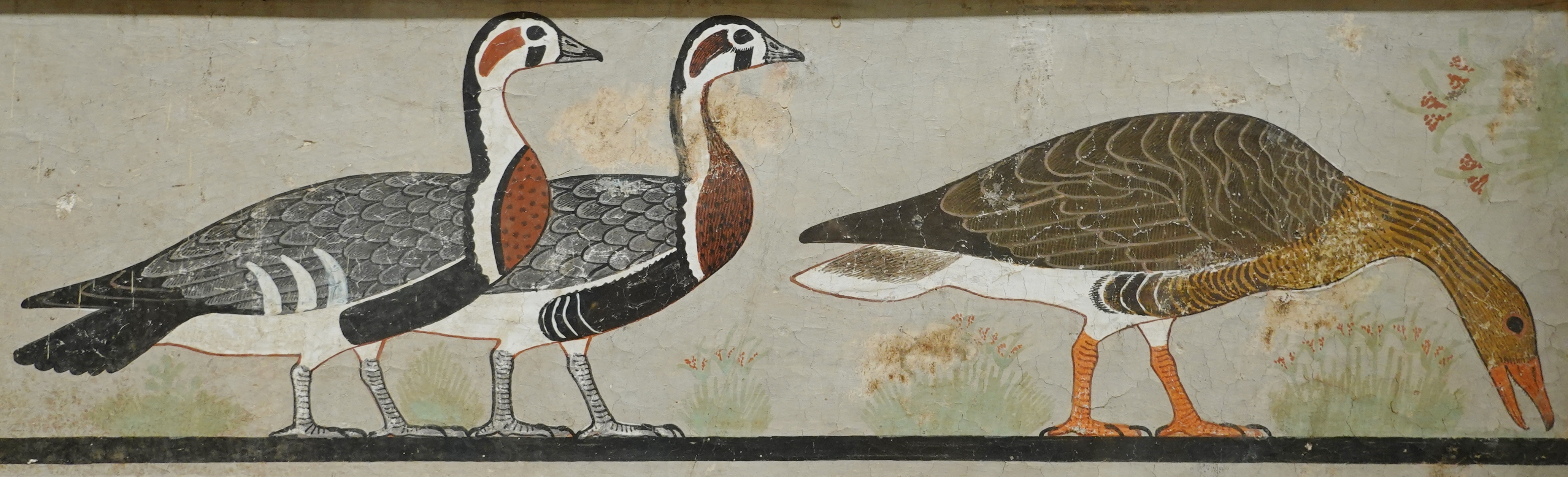 Ausschnitt (rechts) der „Gänse von Meidum“ aus dem Grab von Nefermaat und Atet in Meidum, 4. altägyptischen Dynastie, ausgestellt im Ägyptischen Museum in Kairo, Ägypten